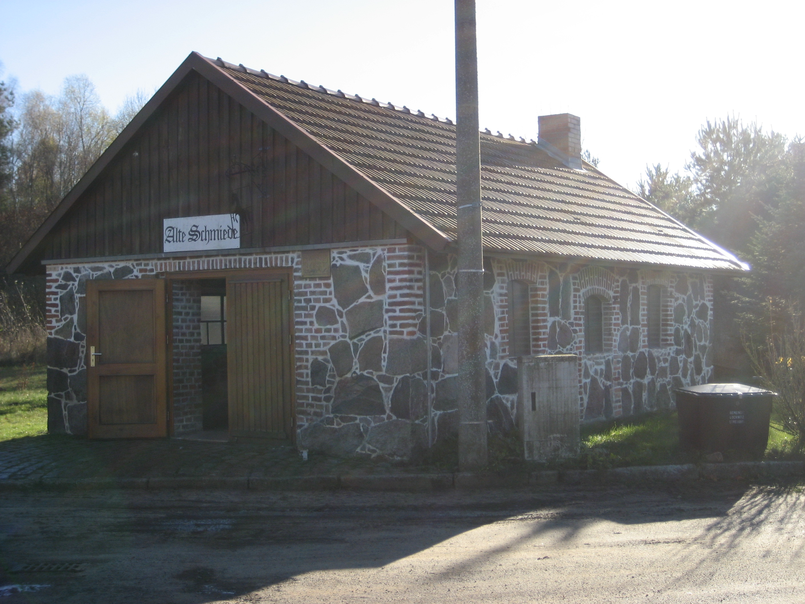 Alte Dorfschmiede in Gorkow aus Blickrichtung Norden.